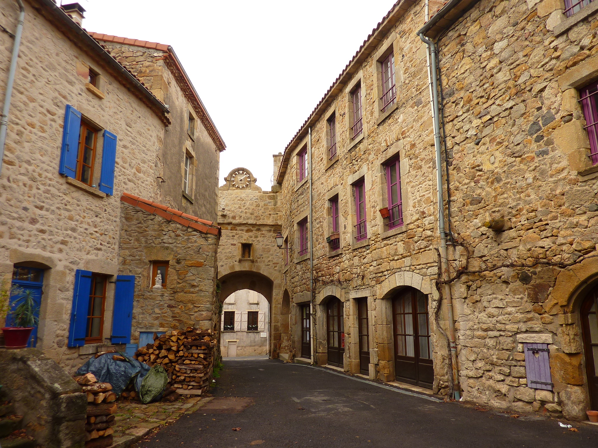 Rue typique du village de Montpeyroux